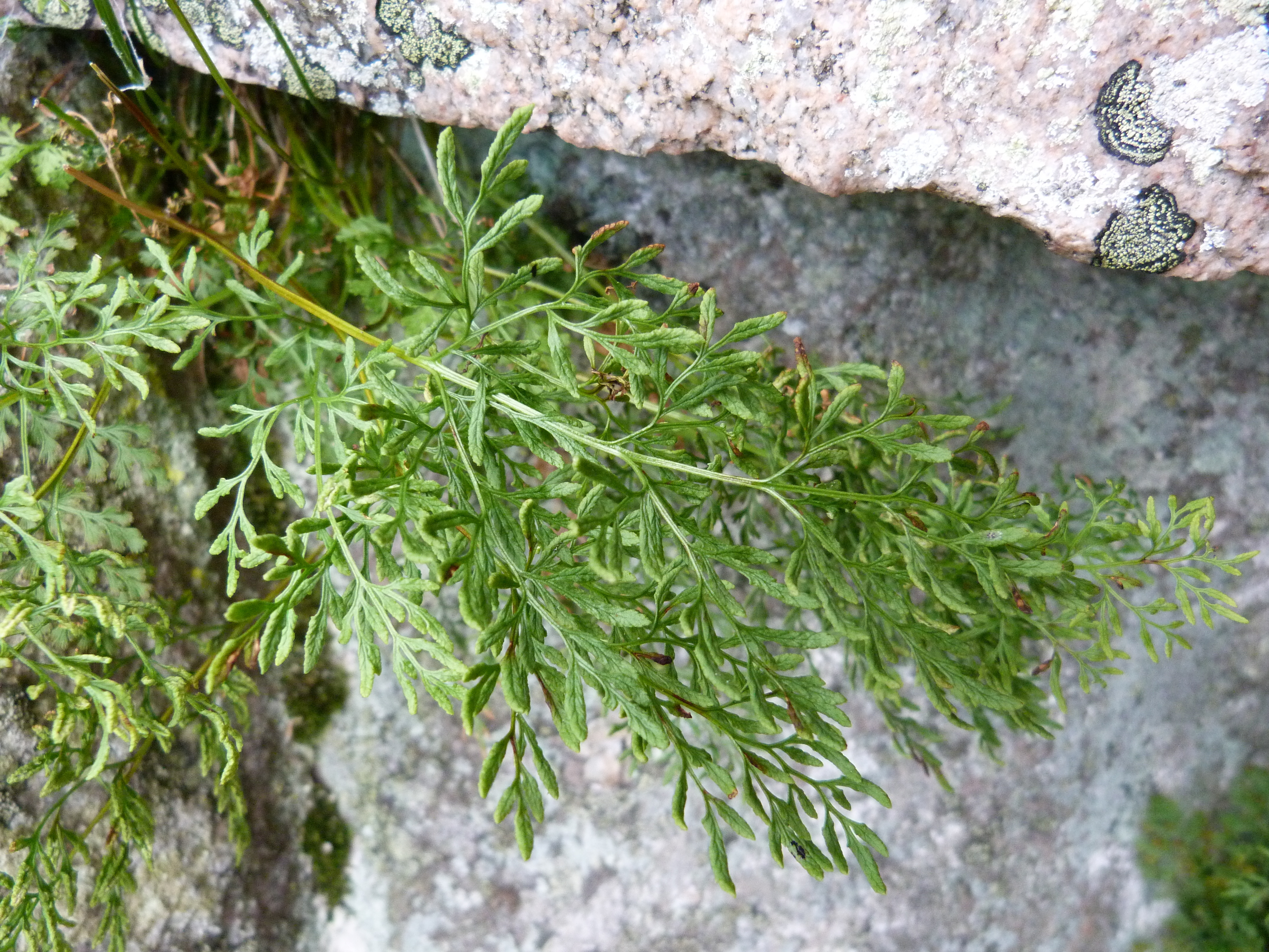 Allosore crépu (Cryptogramma crispa) dans le massif des Vosges.